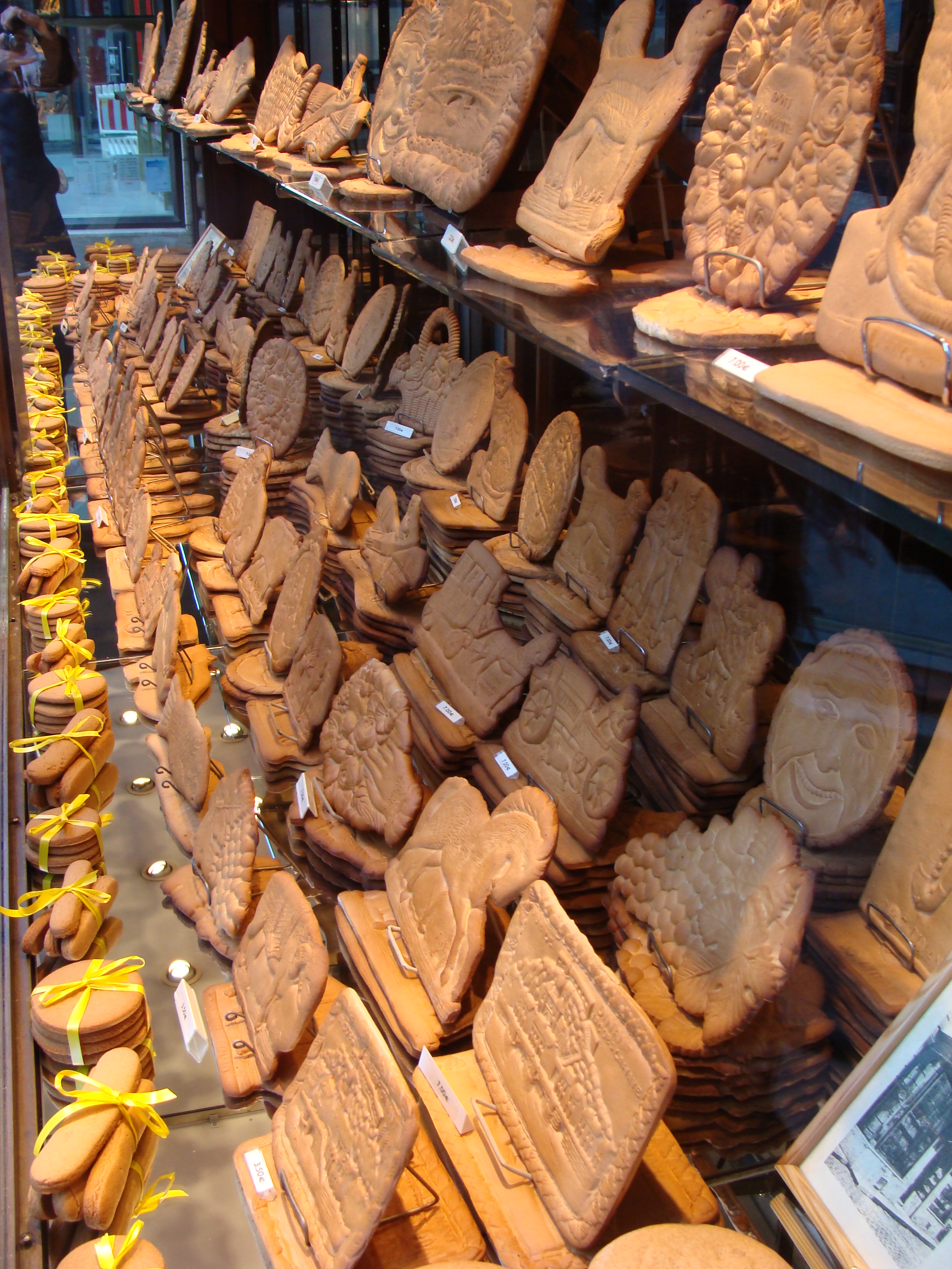 cou cou couque de dinant ant ant Dinant, Belgique, 04/2012